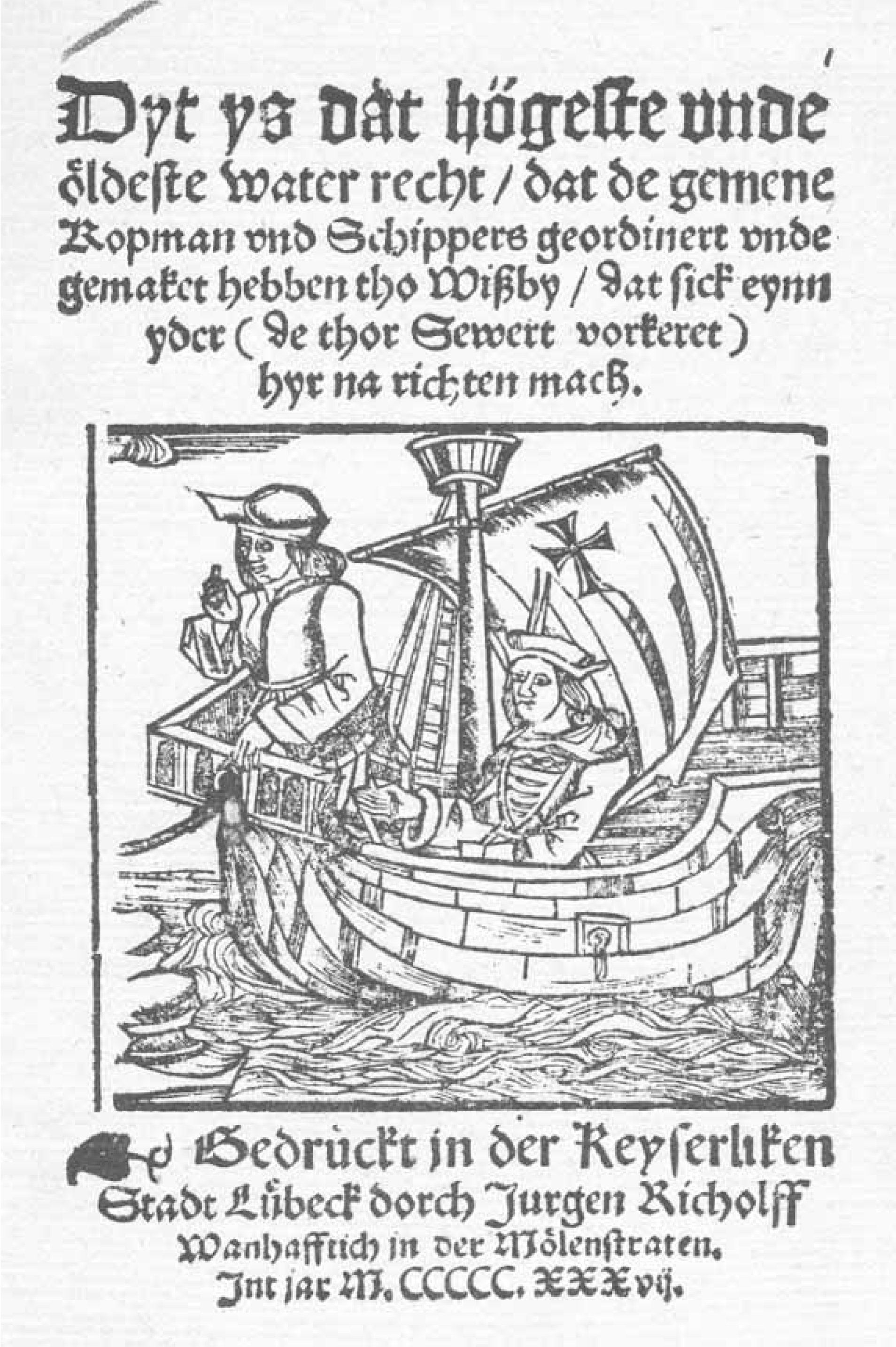 im VD16 unter der Nummer D 2067